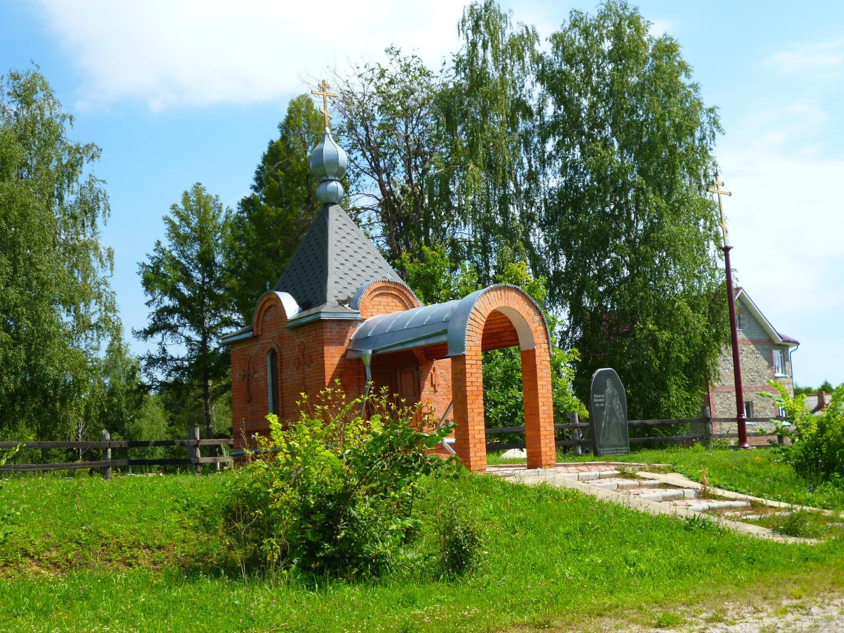 Путешествие